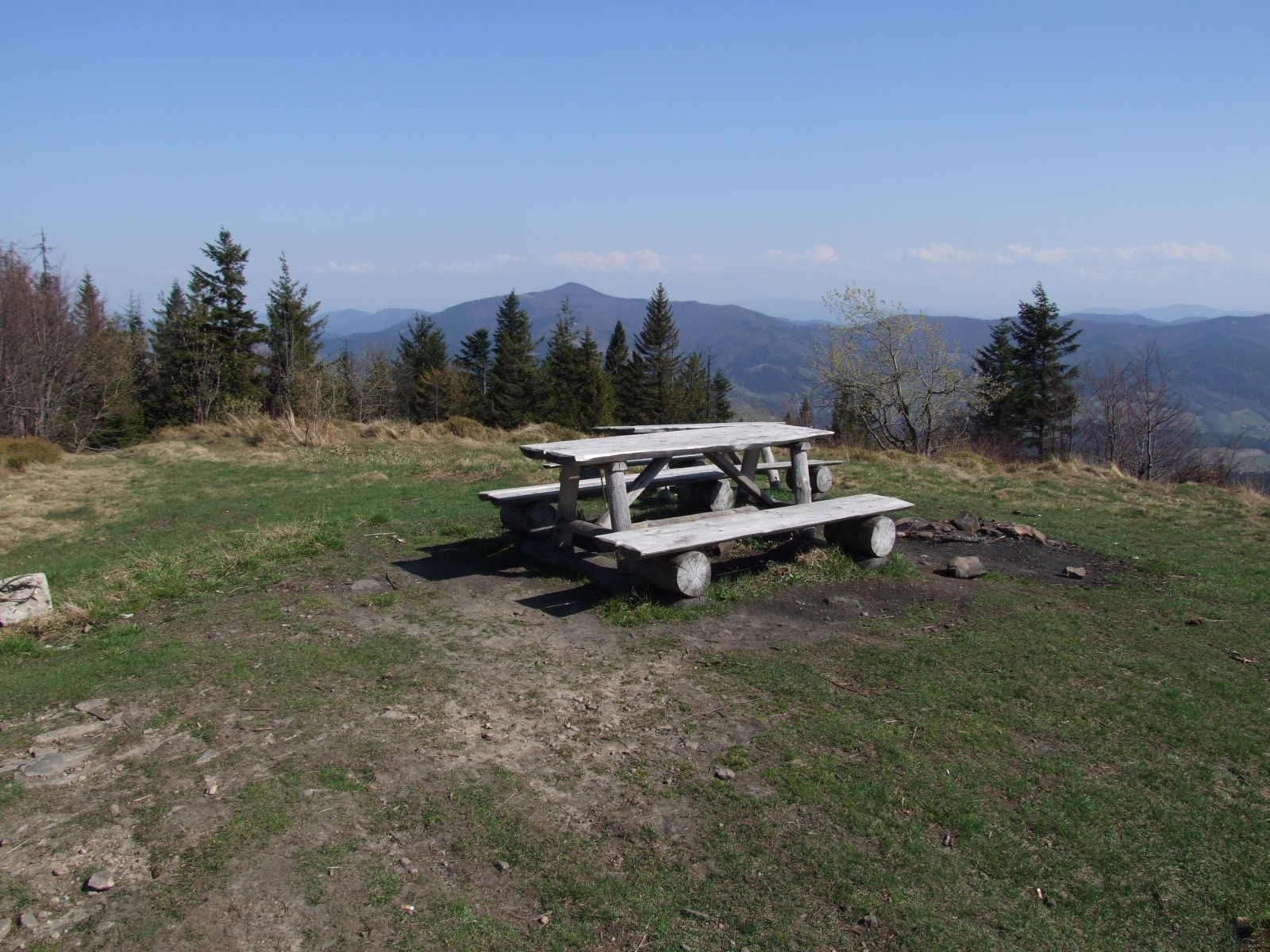 Polana Michurowa naszczycie Ćwilina. Widok na Mogielicę